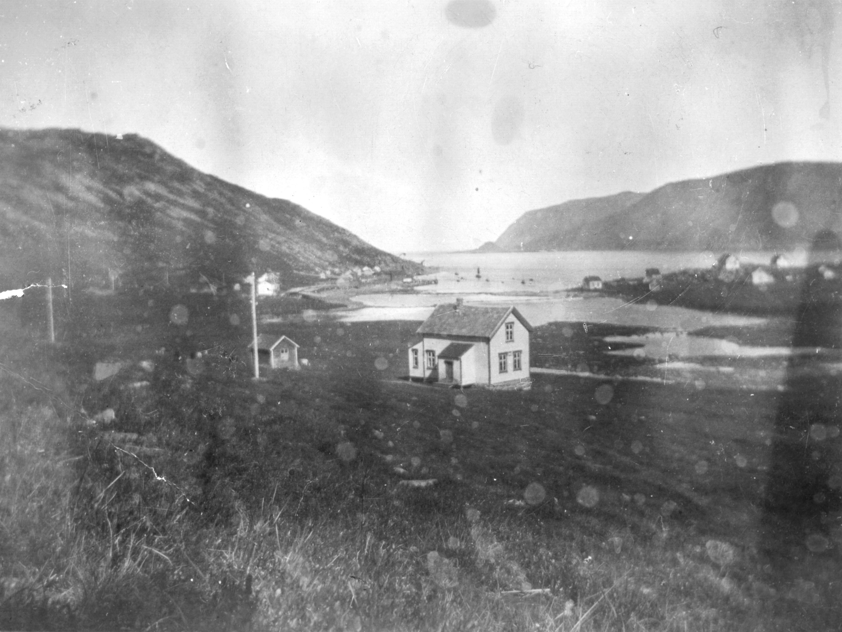 Fiskeværet Skarsvåg fotografert på 1920-tallet.